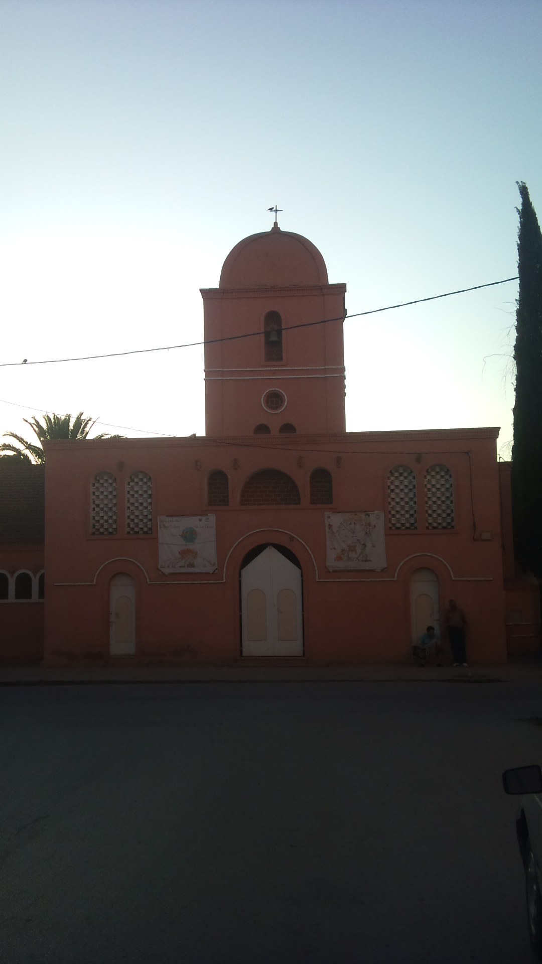 Een verlaten kerk in Berkane gebouwd in de tijd van het Franse protectoraat. Nu in gebruik als milieu- en educatiecentrum door Association de development et environnement